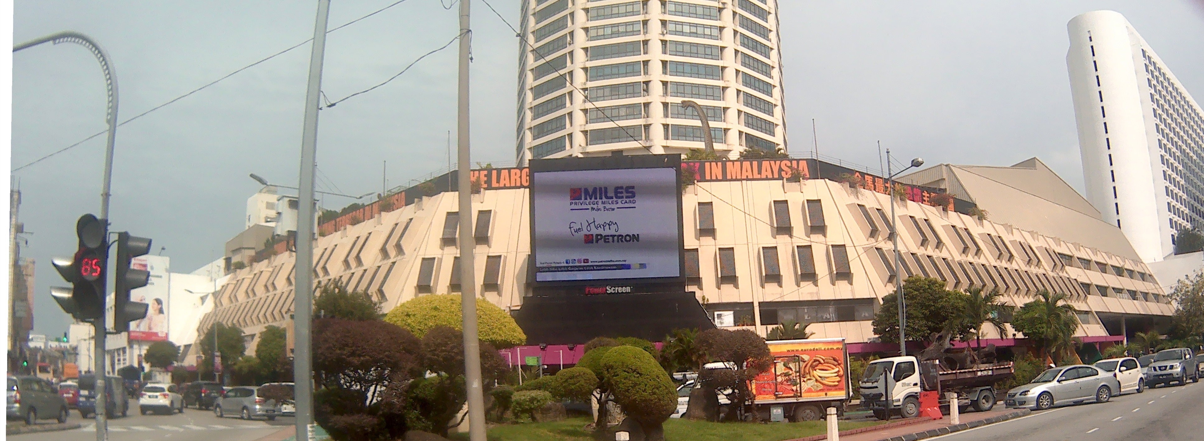 光大大厦的底楼区域